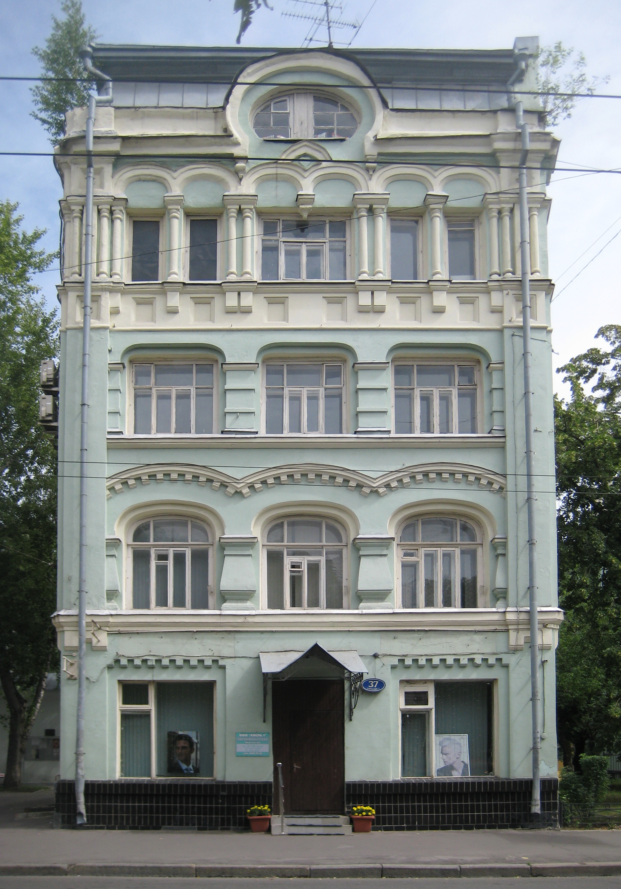 Ostozhenka